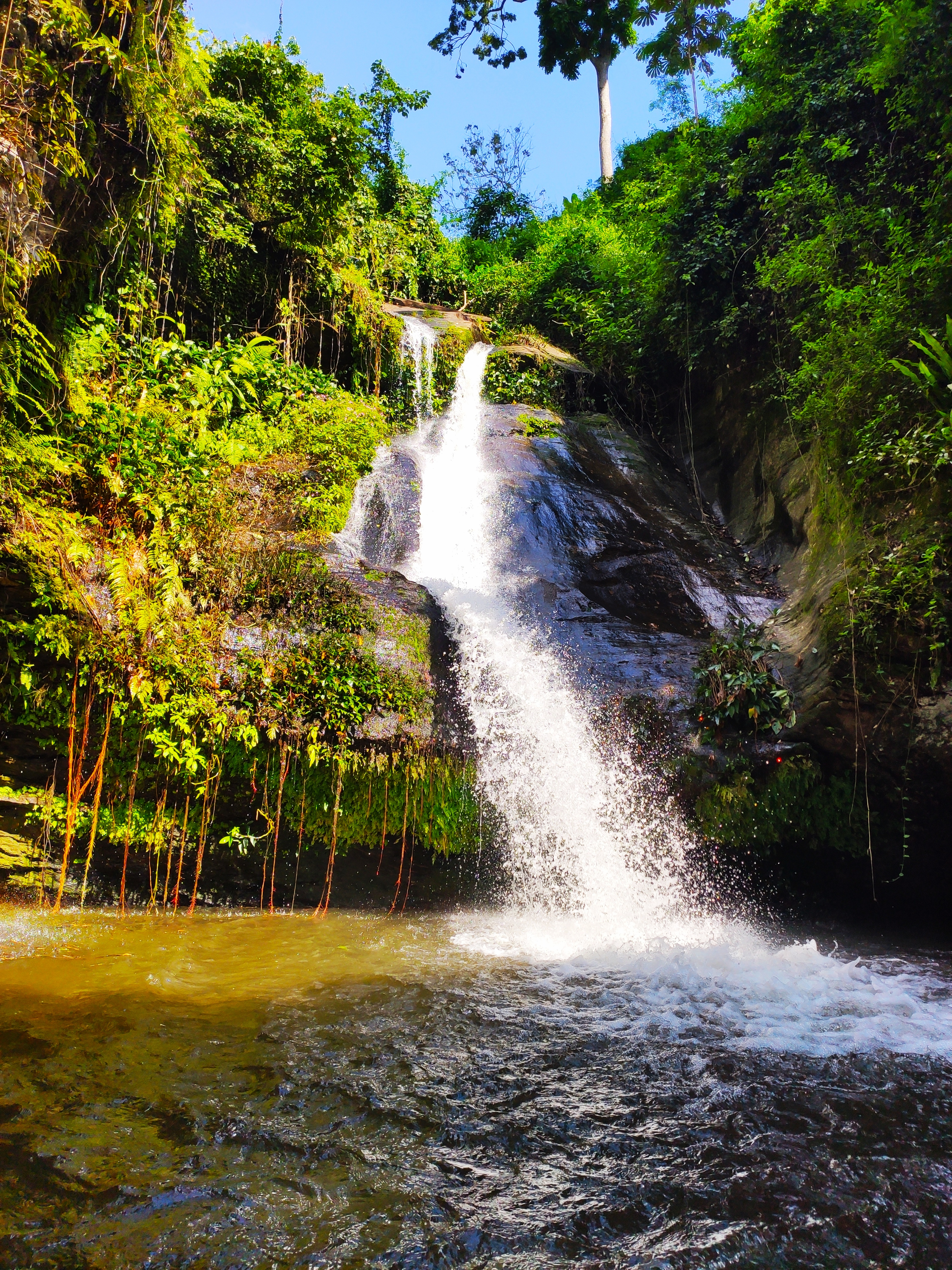 Après 1 heure de piste, en 4x4 et descente à pied en pleine forêt du Togo entre jungle et broussaille. Découverte de la cascade de Womé. This is an image with the theme "Africa on the Move or Transport" from: Togo